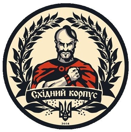 Емблема Громадської організації «Східний корпус».